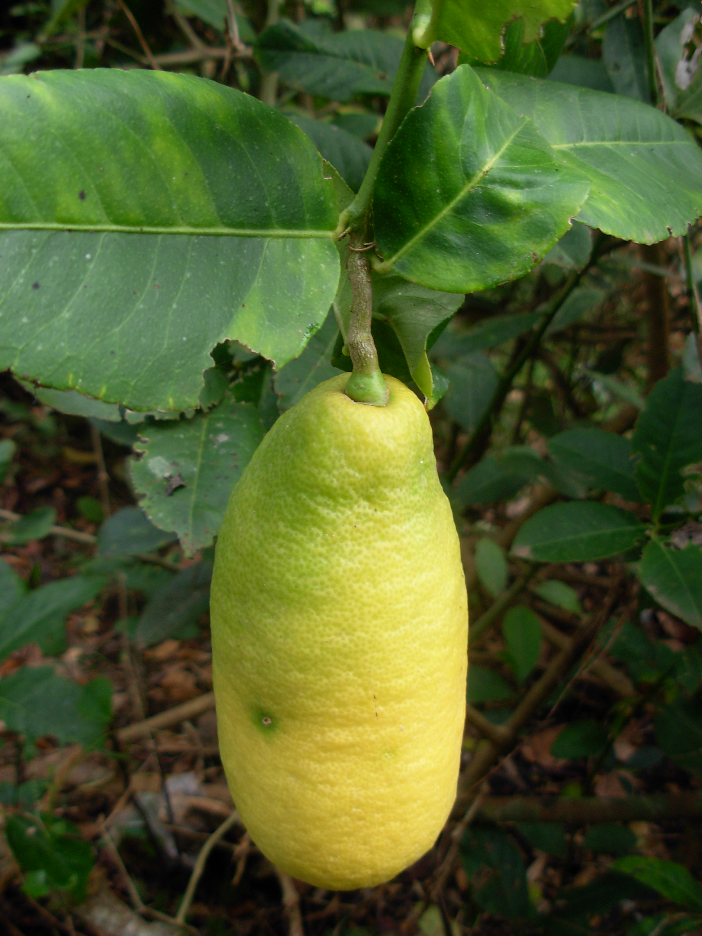 Odichukuthi lime